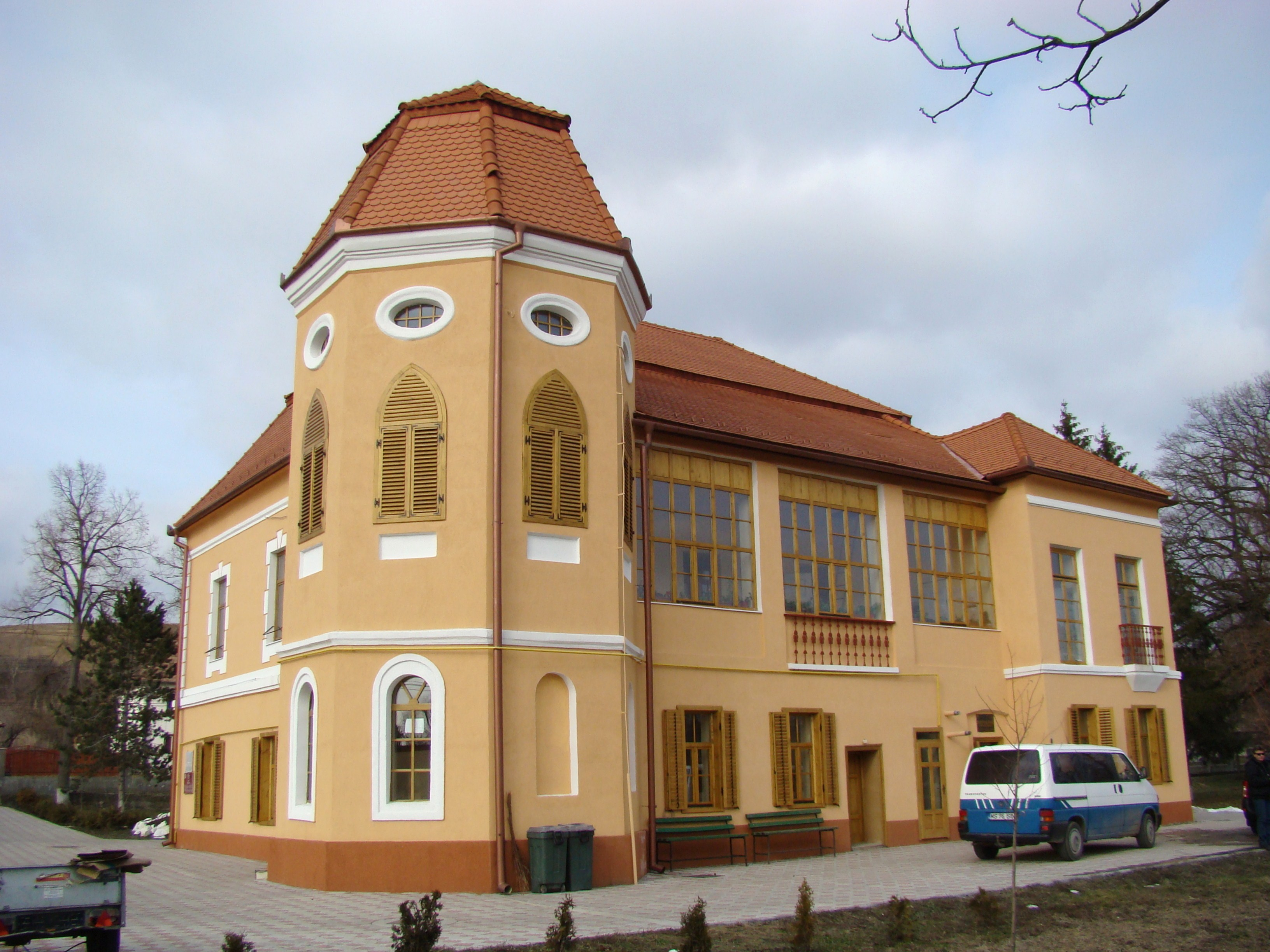 Conacul Keresztes-Eperjesi sat Mica; comuna Mica